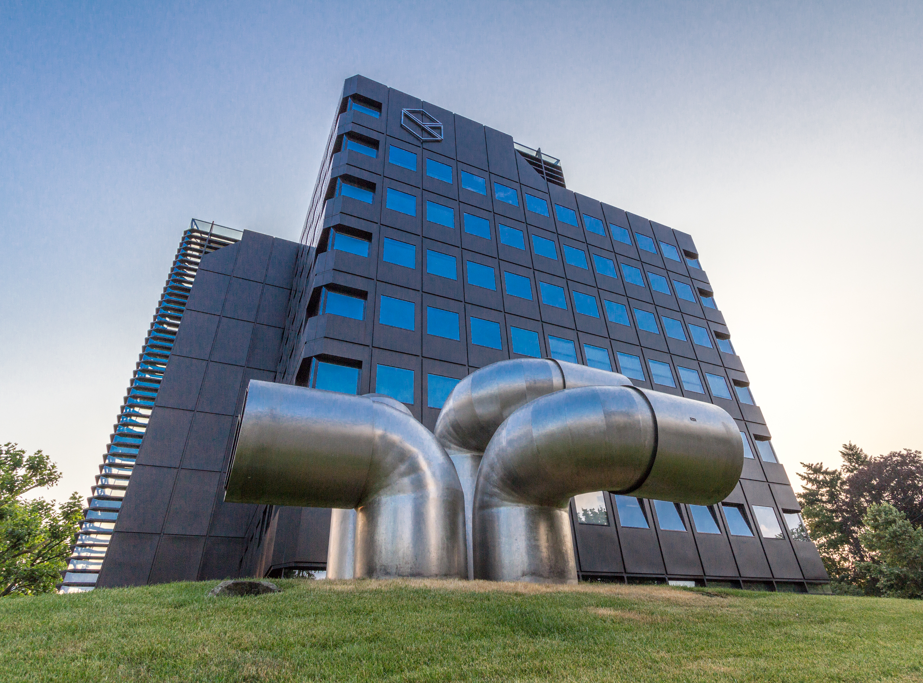 Bürogebäude der Westdeutschen Lotterie (Münster), Ansicht von der Sperlichstraße; im Vordergrund: Entlüftungsskulptur (Friedrich Gräsel, 1977) Building TitleWestdeutsche LotterieArchitectHarald DeilmannDate1958, 1978, 1994 Sculpture TitleEntlüftungsskulpturArtistFriedrich GräselDate1977